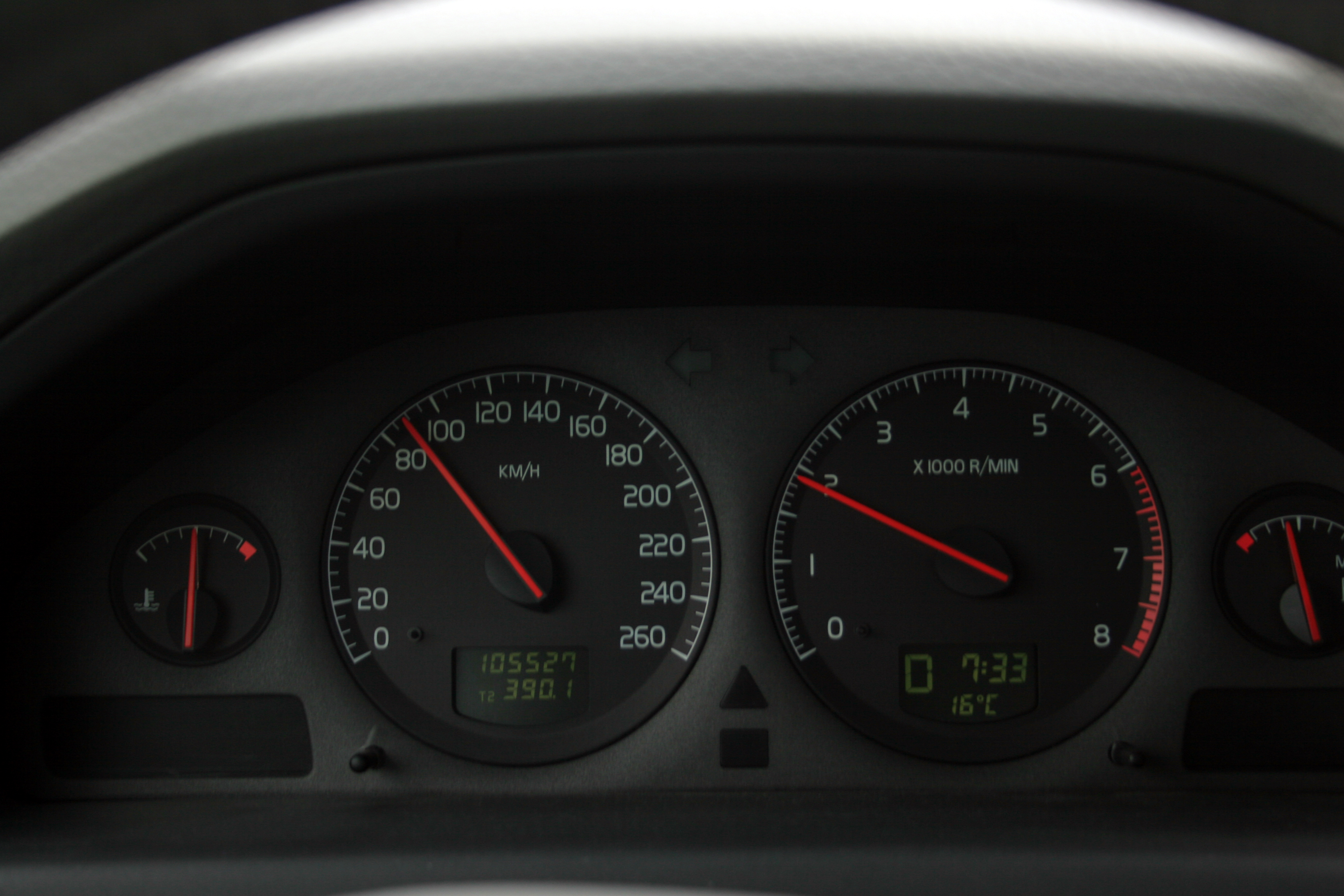 Speedometer in a Volvo S80 MY 02.